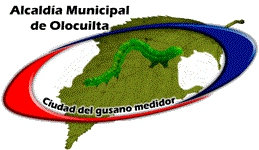 Escudo de Olocuilta